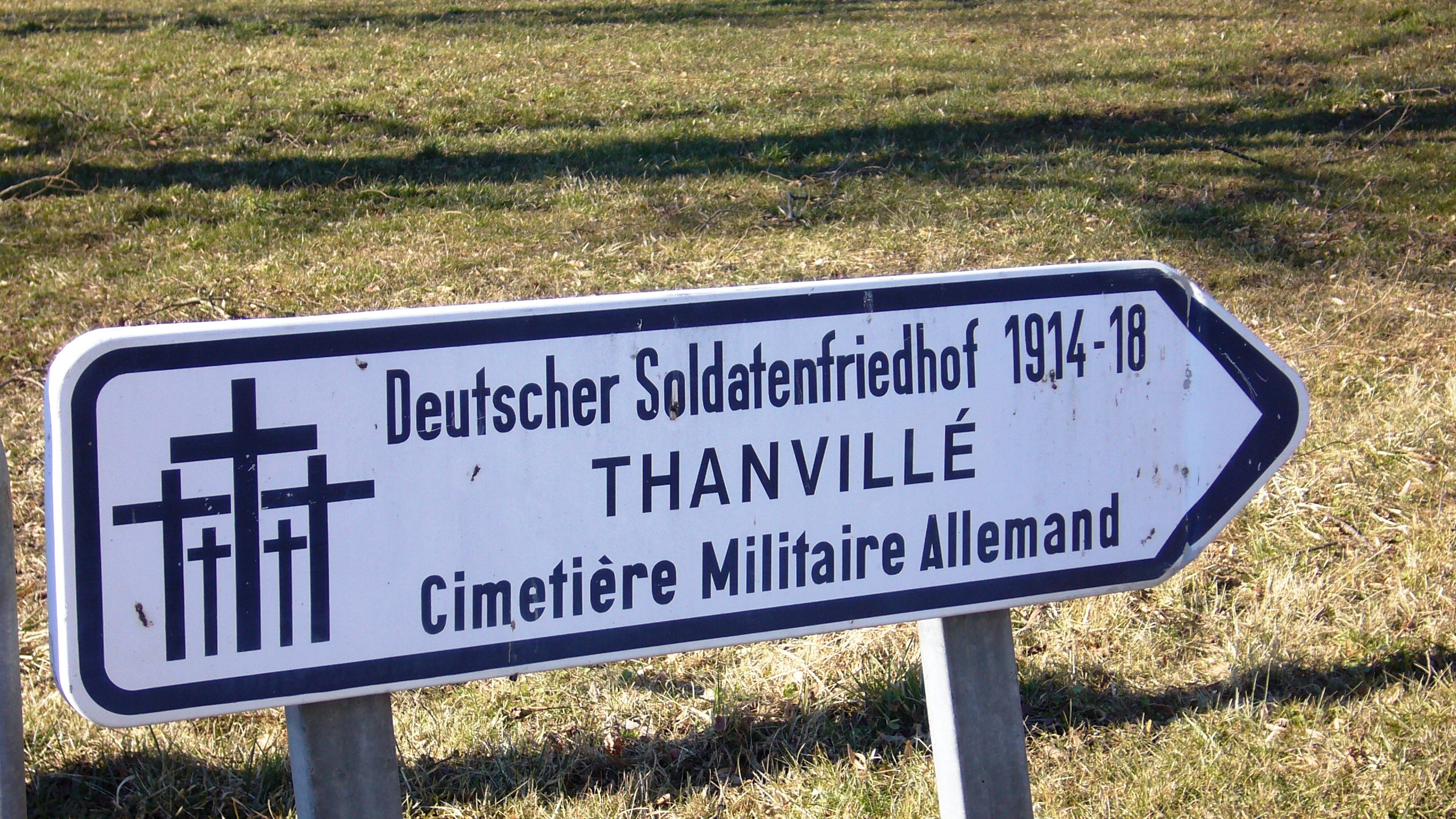 Panneau indiquant la direction du cimetière militaire allemand de Thanvillé